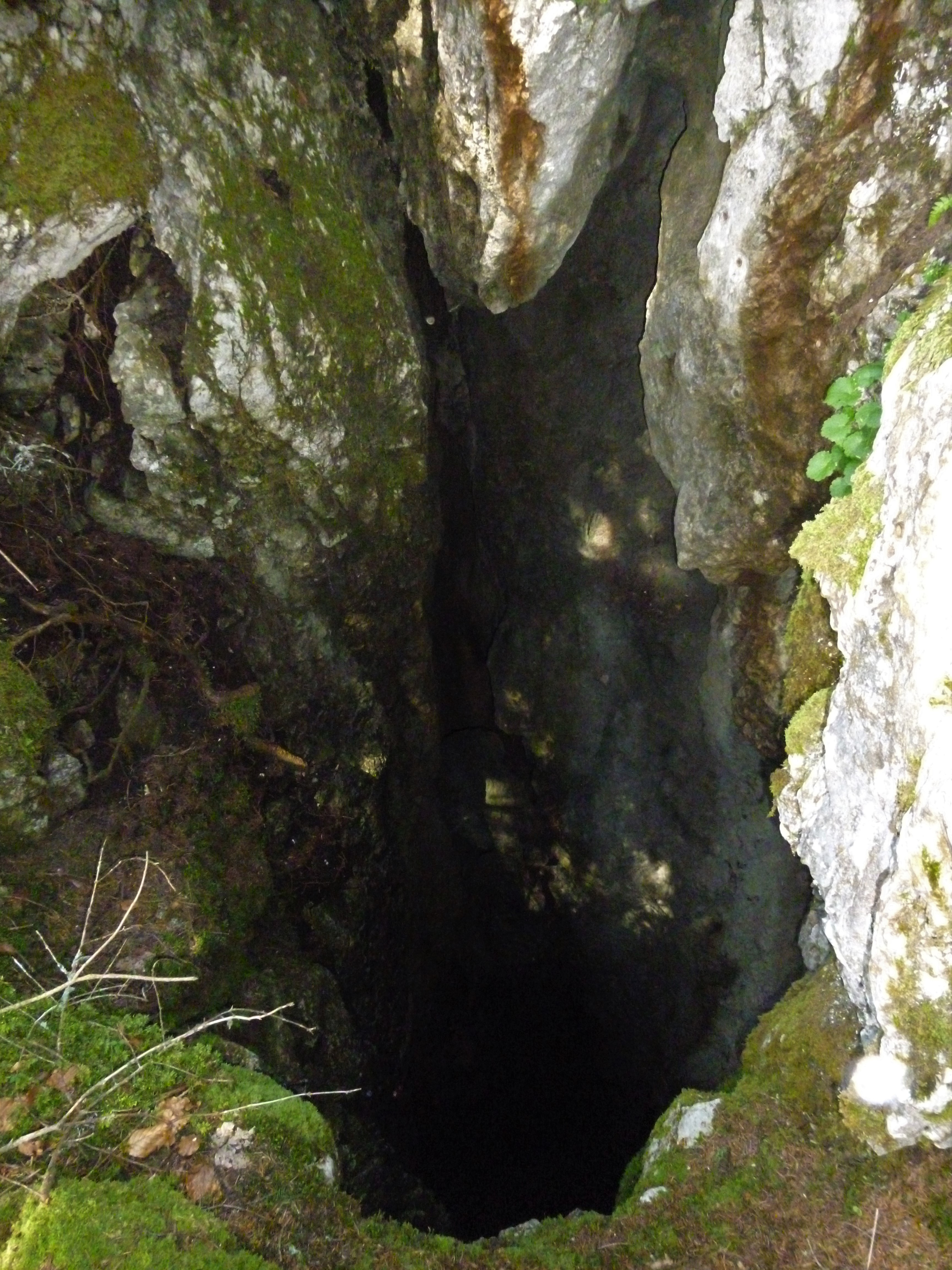 Le premier puits, 27 m, du gouffre Kriska.